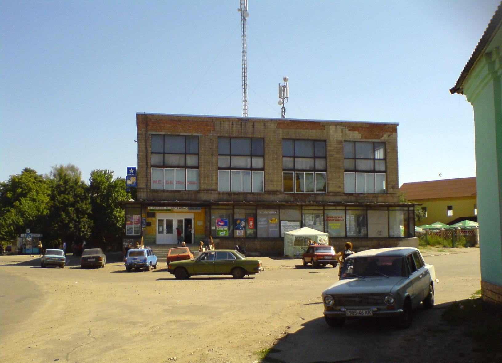 Универмаг в Люботине, Харьковская область